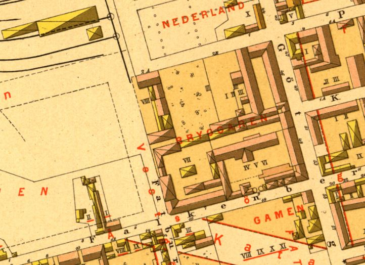 Del av Alfred Rudolf Lundgrens karta över Stockholm, visande kvarteret Bryggaren (dagens Nattugglan)